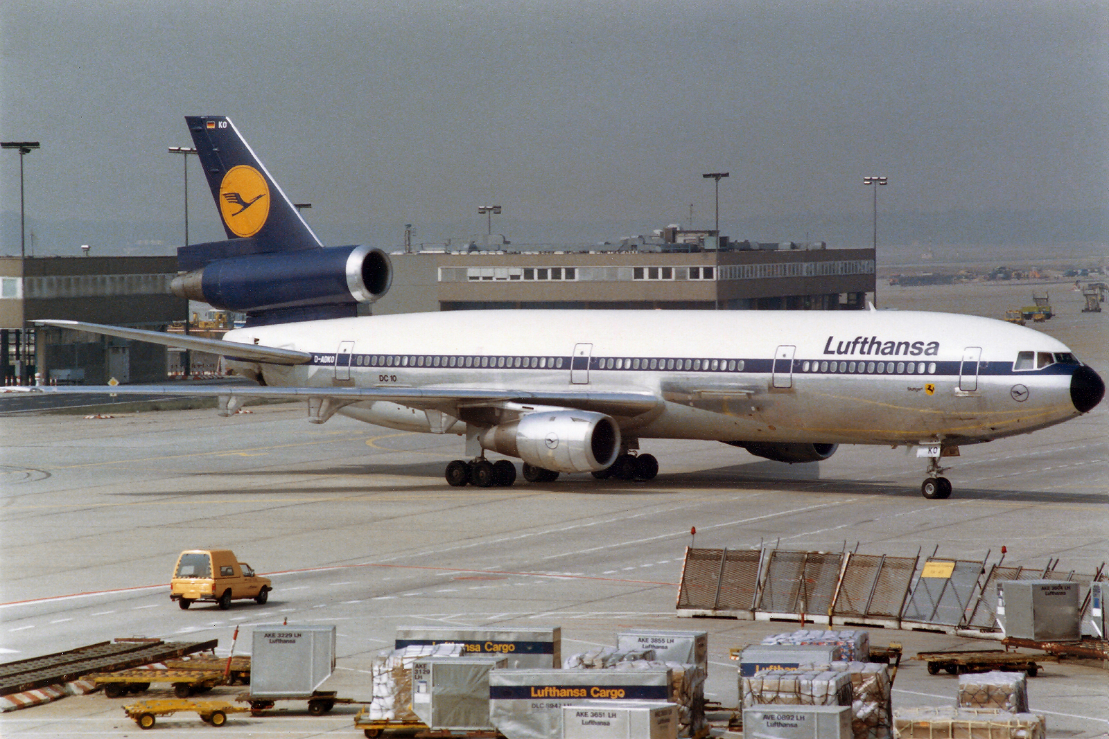 Frankfurt am Main (Rhein-Main AB) (FRA / EDDF / FRF) Germany 6.1986